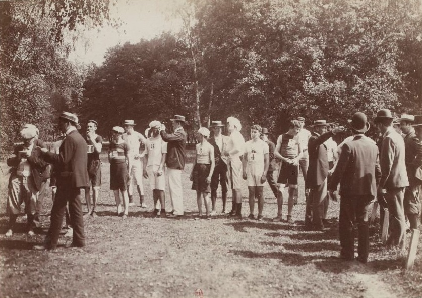 Départ du Marathon des JO 1900 - vue 90